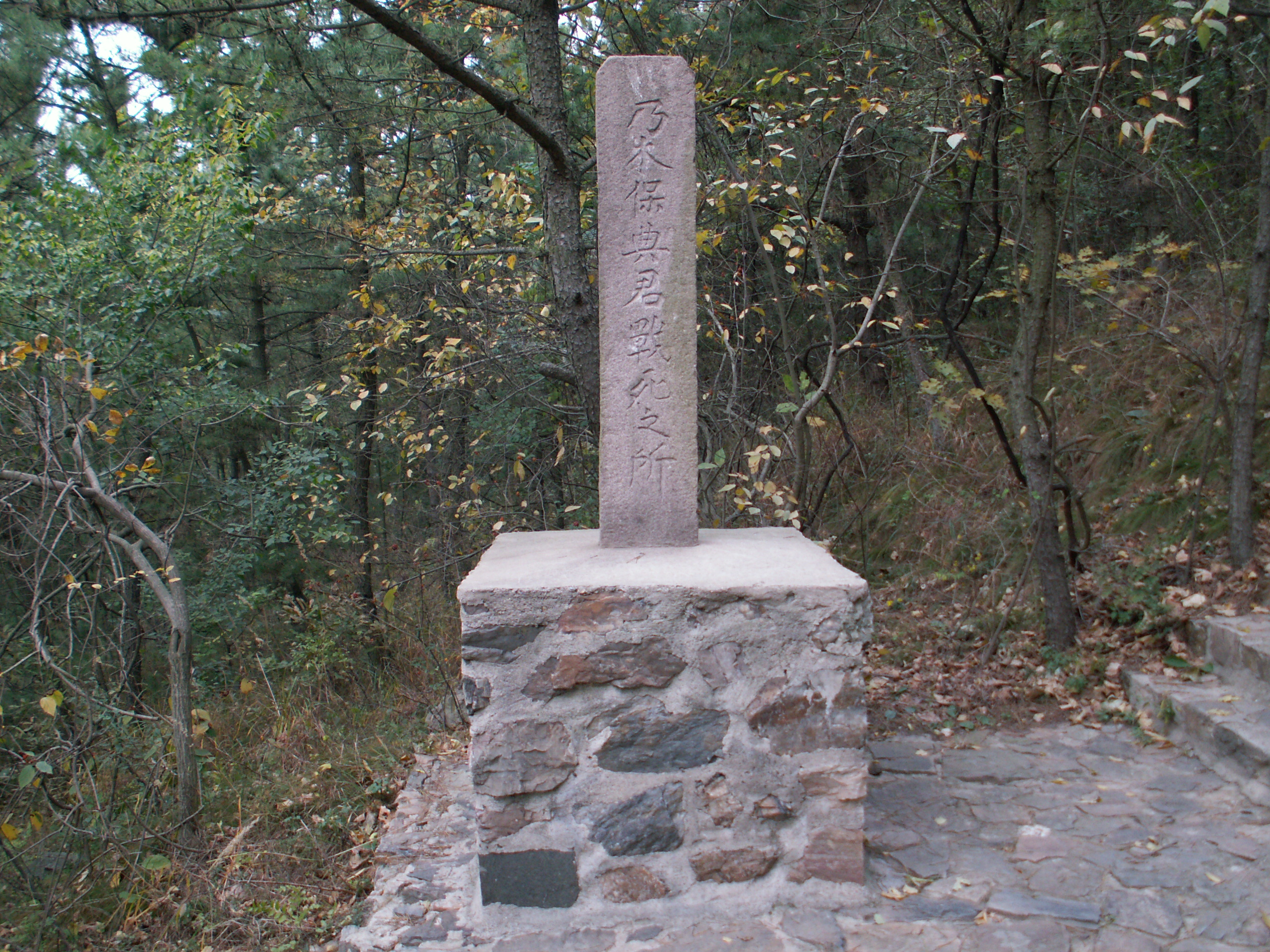 乃木保典戦死の碑。（203高地）